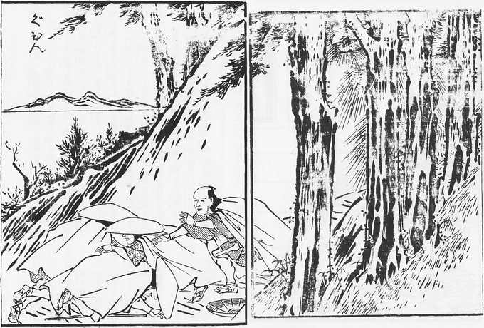 Guhin (狗賓, a kind of tengu) from the Rekkoku-kaidan-kikigaki-zōshi (列国怪談聞書帖)